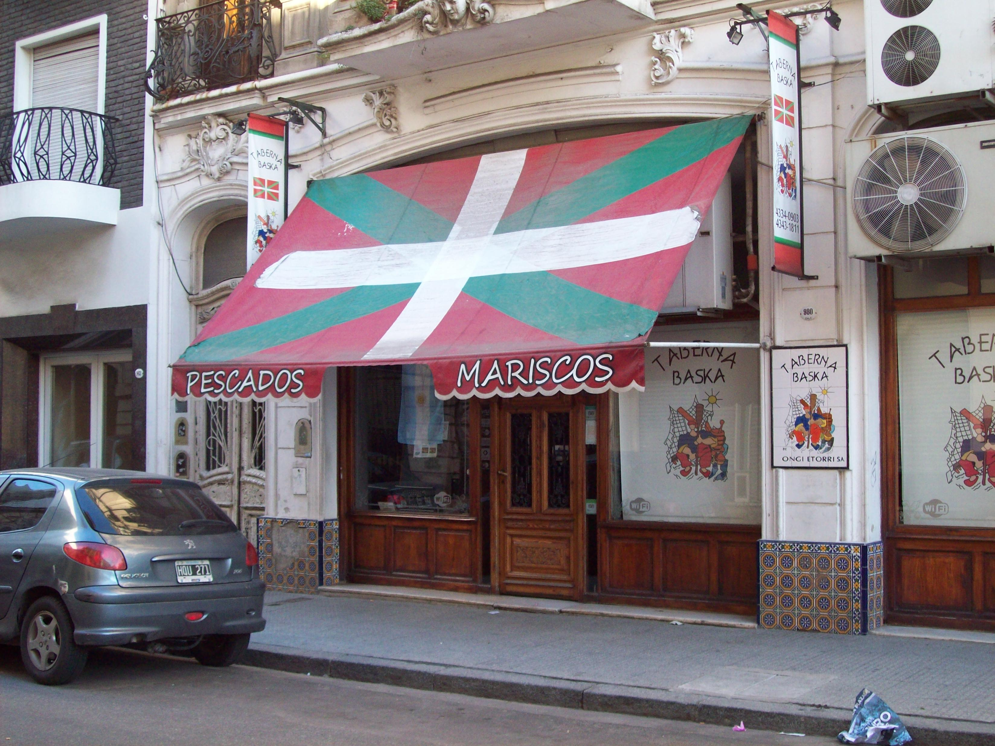 Comida vasca en Buenos Aires, cerca de la 9 de Julio.